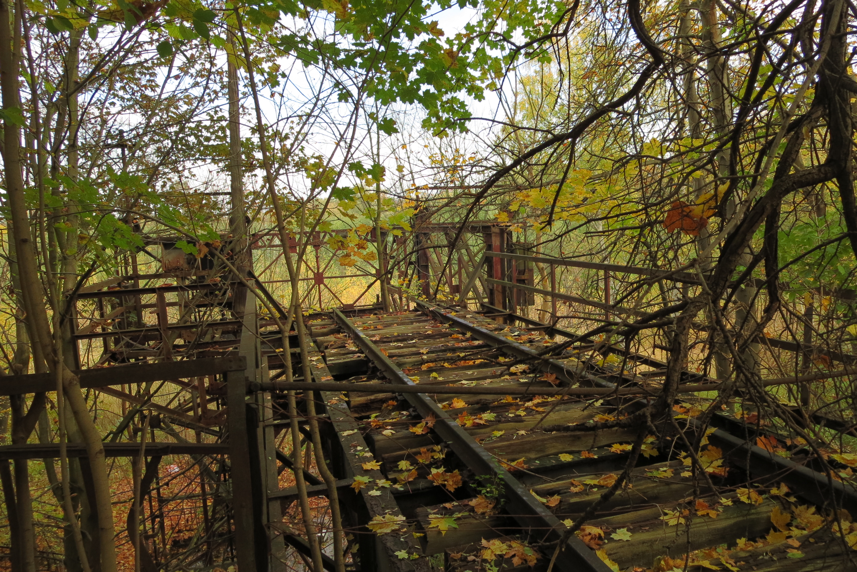 Hufnagelfabrik, Waggonfahrstuhl, obere Bühne mit Gleisanschluss